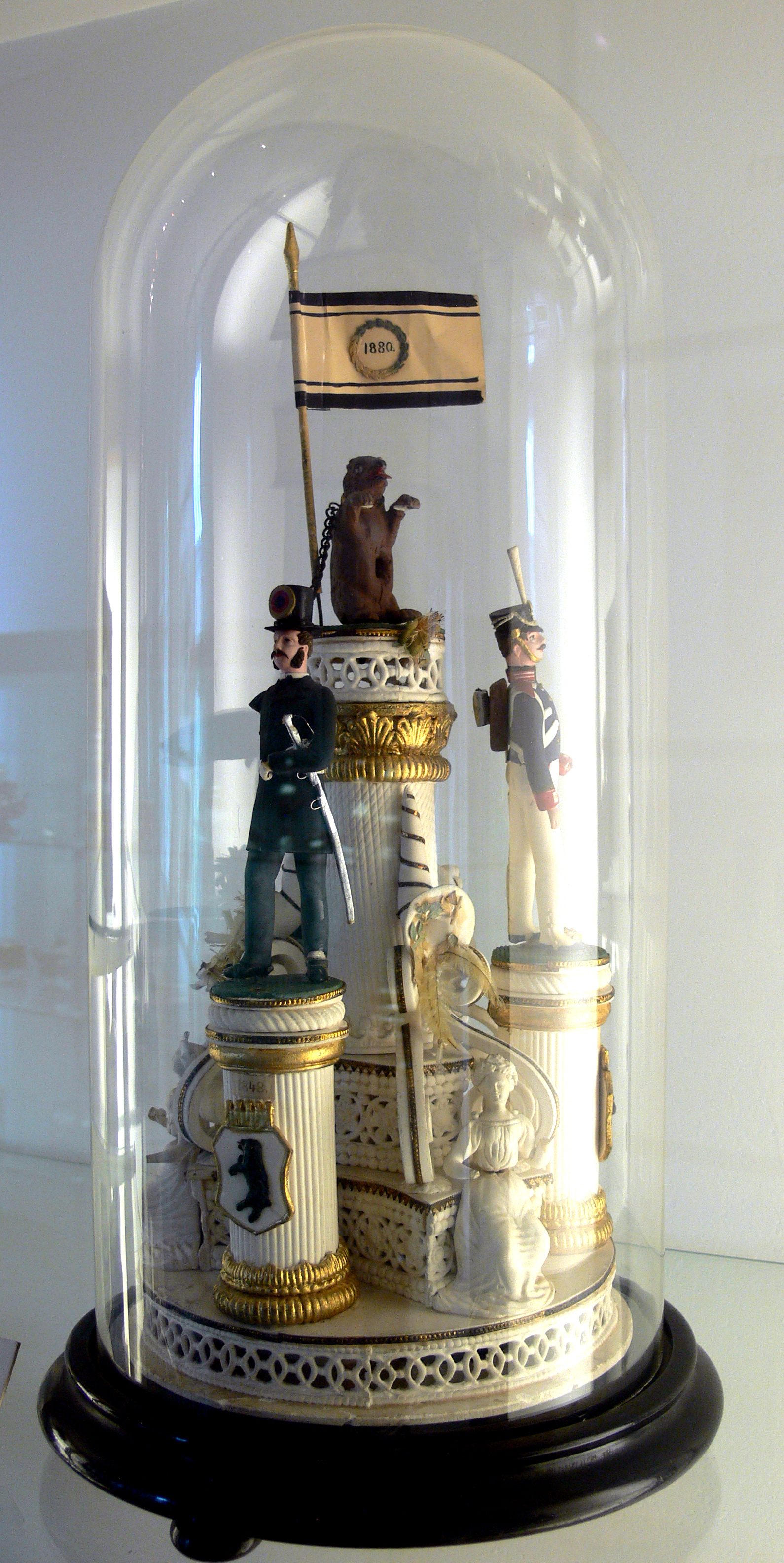 Zuckerplastik von 1880 zur Freiheitsidee (mit Gedenkjahren 1830 und 1848); Zucker-Museum Berlin (Geschenk Prof. Dr. Claus-Peter Gross)